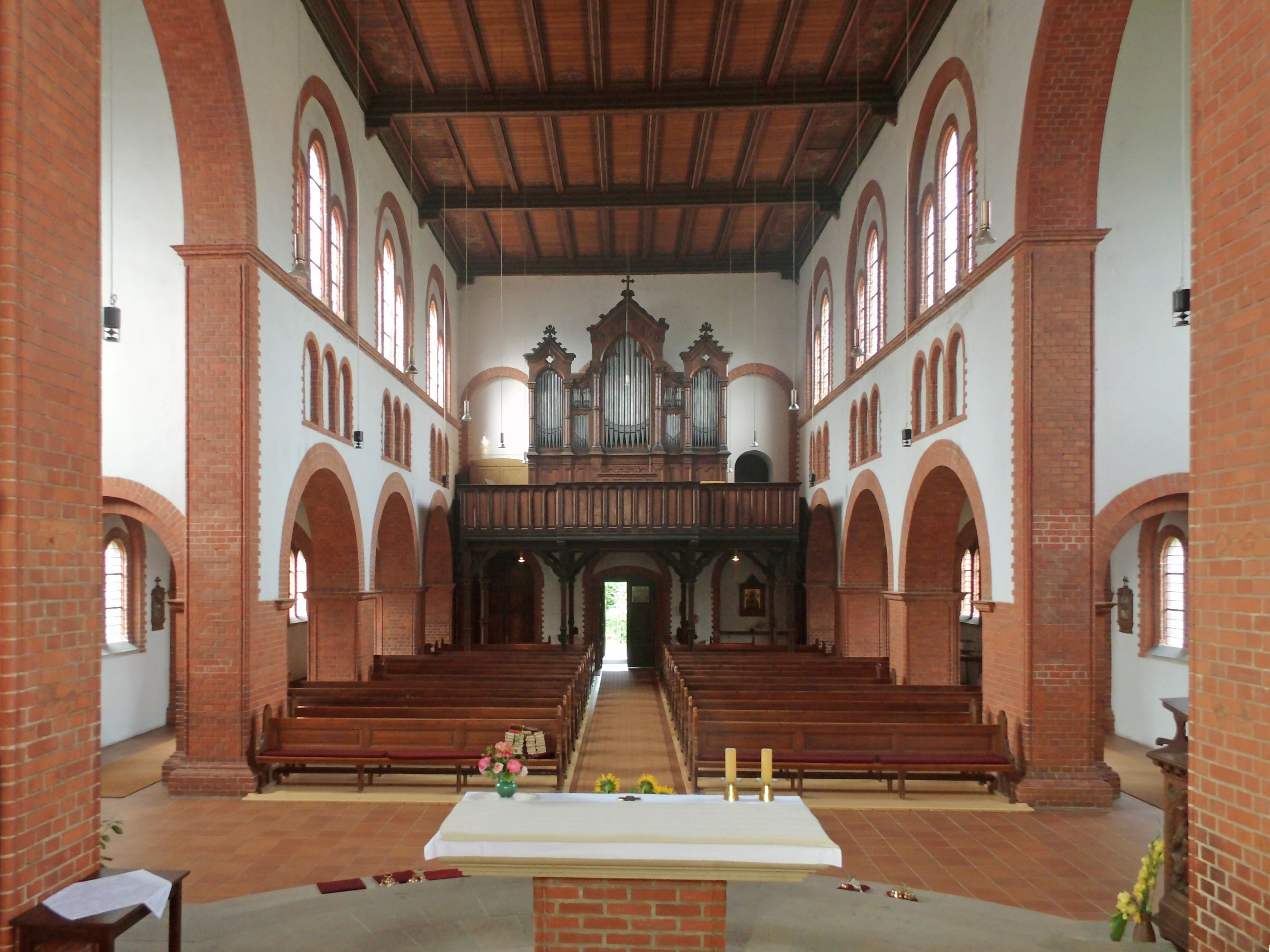 Katholische Kirche St. Joseph und Augustinus, Blick zur Orgelempore